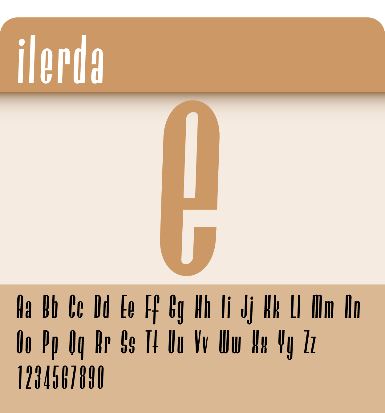 Mostra tipogràfica de la tipografia Ilerda